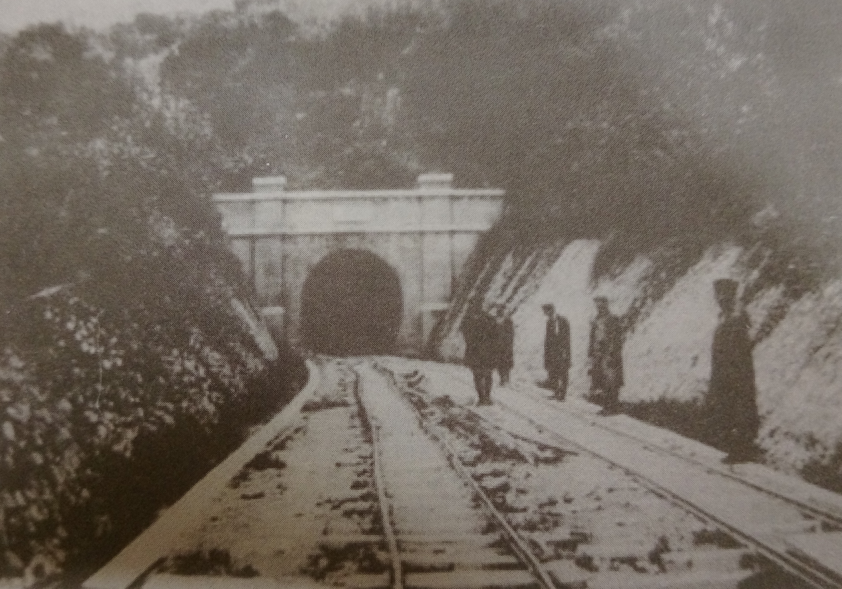 掃叭隧道建設工程進行中，掃叭隧道北口。